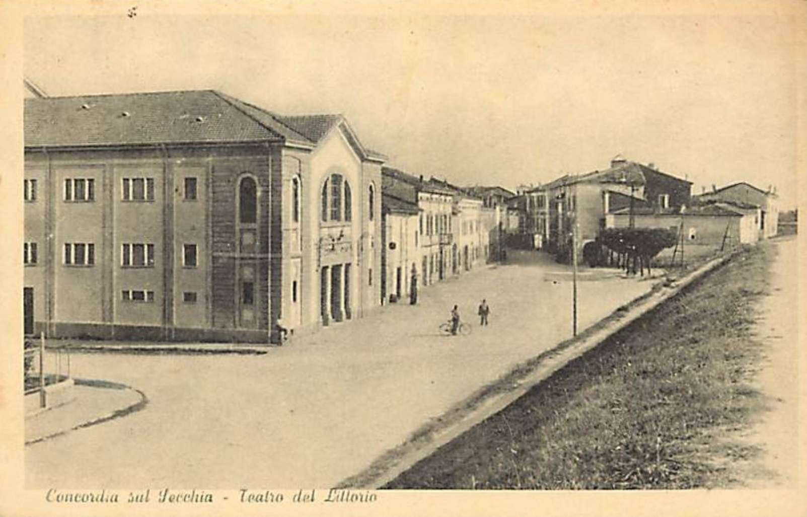 Teatro del Littorio (oggi Teatro del Popolo) a Concordia sulla Secchia